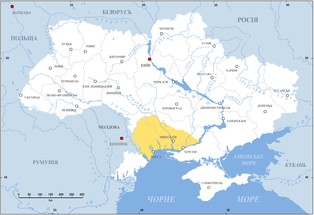 Едісан